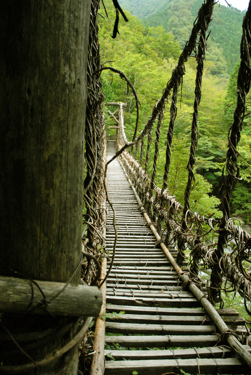 徳島県三好市東祖谷に架かる奥祖谷二重かずら橋